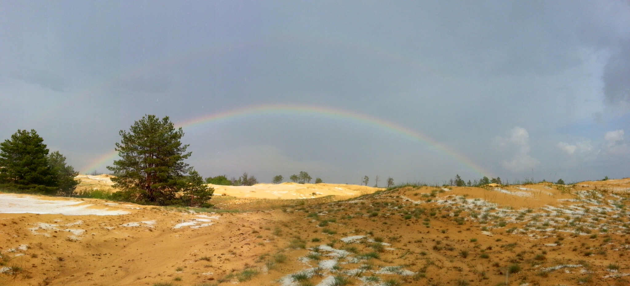 Олешківські піски, Цюрупинський район, вул. Заводська, 1в, с. Раденськ